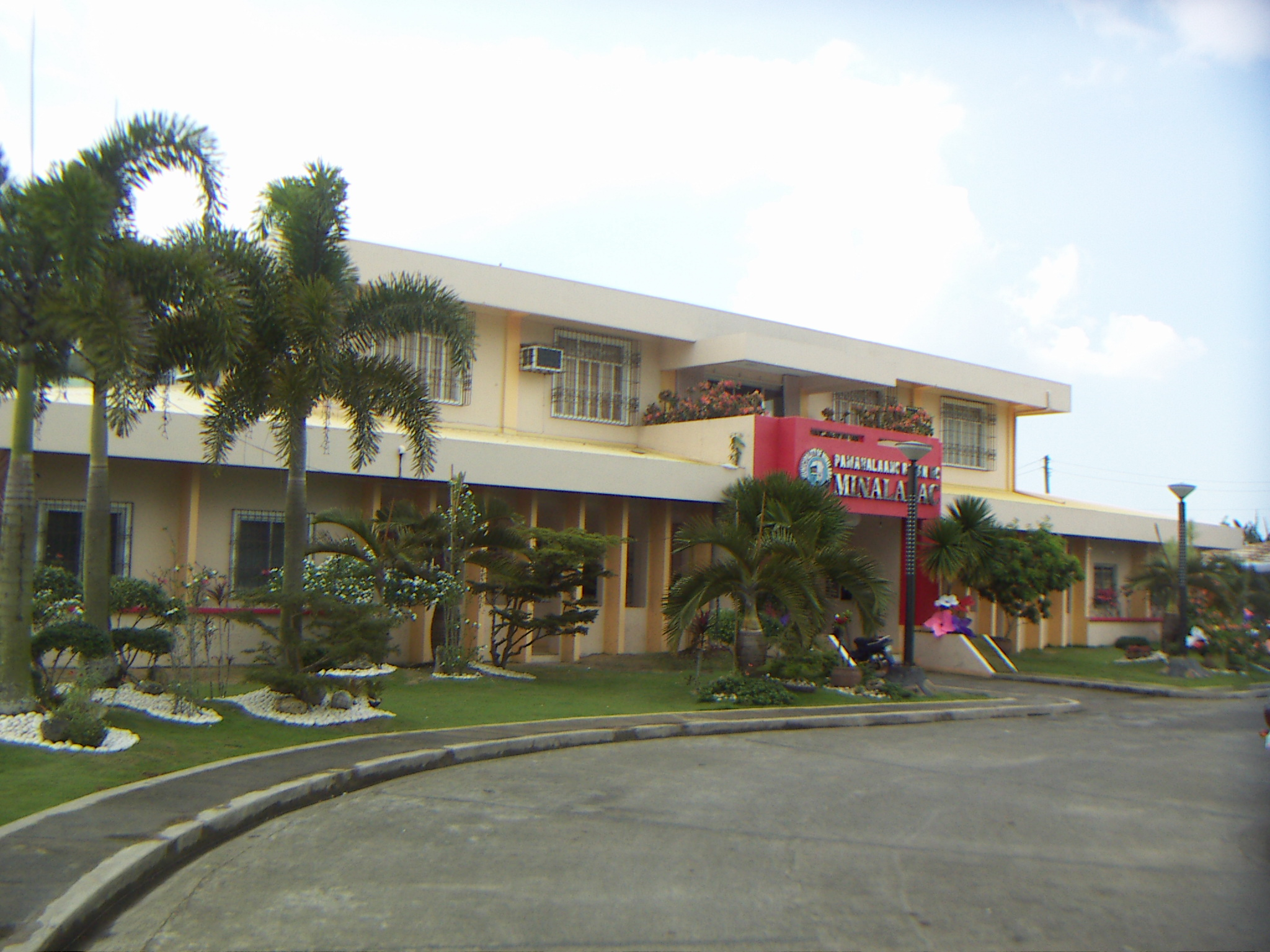 Minalabac, Camarines Sur, Philippines